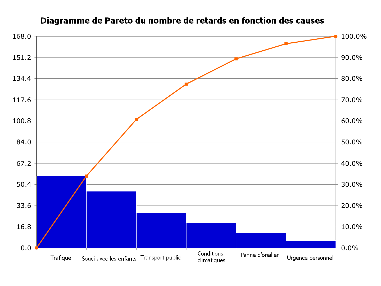 Diagramme de Pareto simple